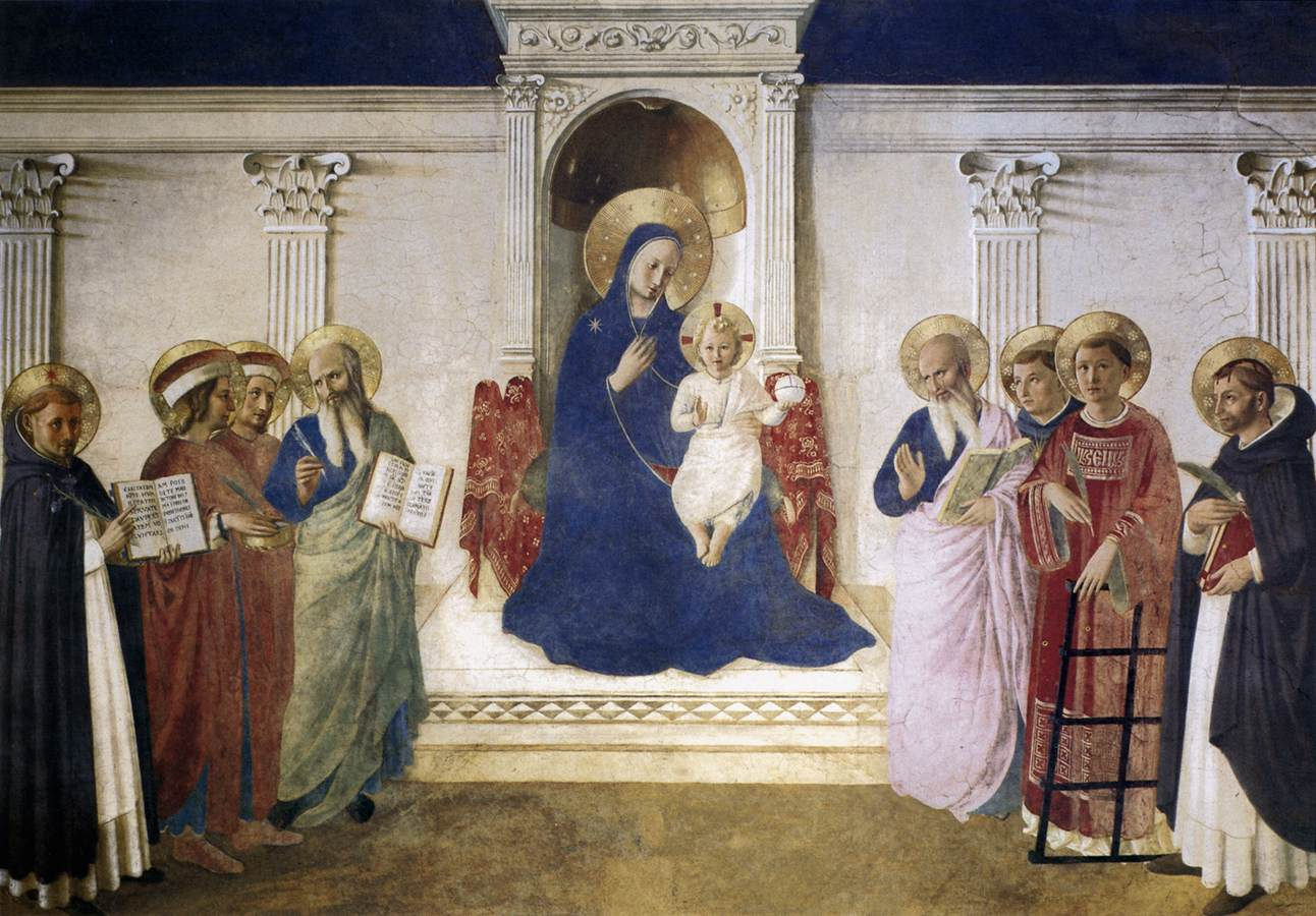 Sacra Conversazione Fresco, 195 x 273 cm